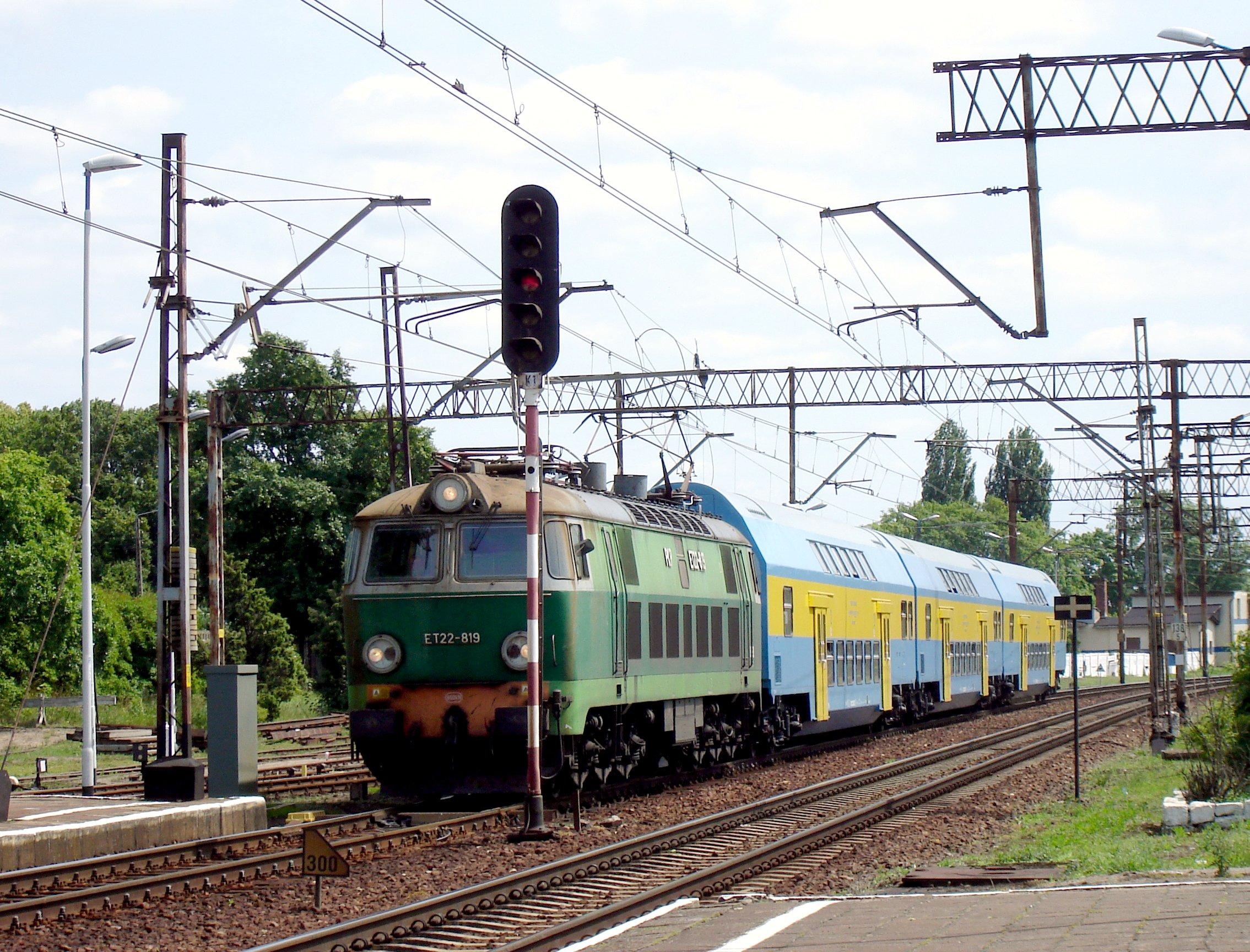 Pociąg InterRegio Wrocław - Świnoujście, na stacji Choszczno.